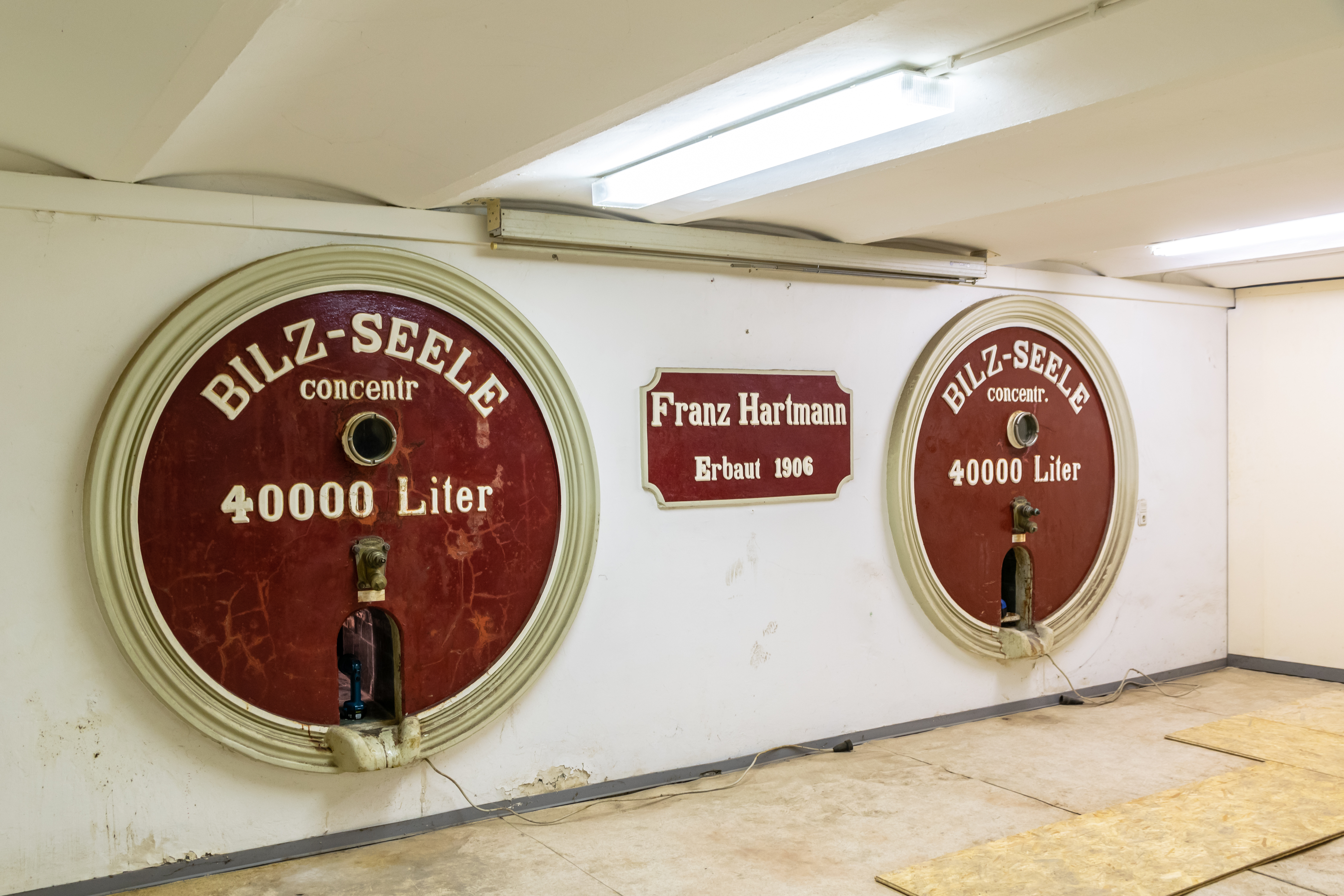 In den Jahren 1906 bis 1912 wurden auf dem Gelände der Sinalco in Detmold sieben unterirdische Tanks ("Fässer") gebaut. Es handelt sich dabei um mit Glausbausteinen ausgekleidete Kellerräume, die nur über einen Tankdeckel zugänglich sind.